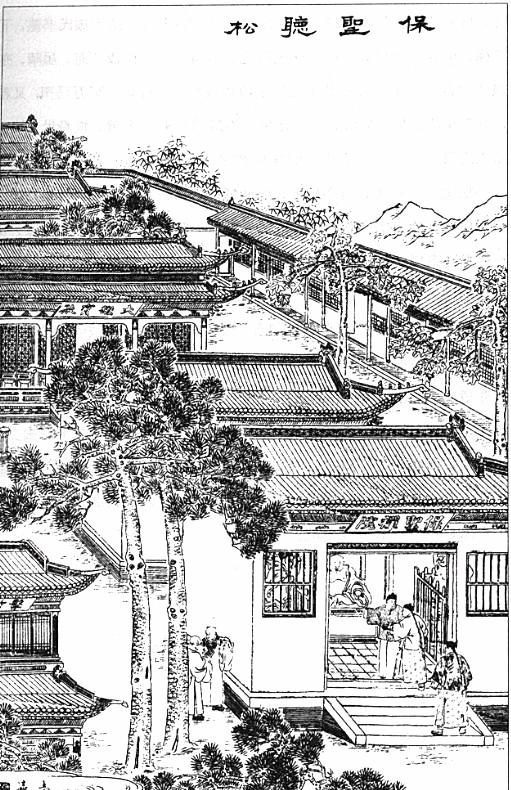 保圣听松 此图刻于1890年